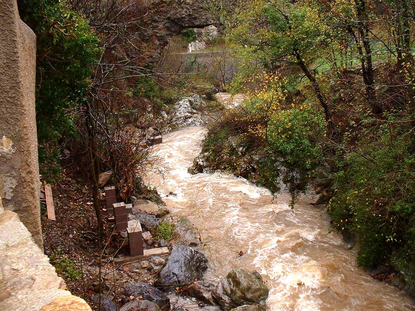 Laroque-de-Fa (France) - Le Sou (2)